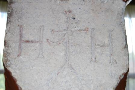 Wappen, spätgotischer Hof in Birkinen